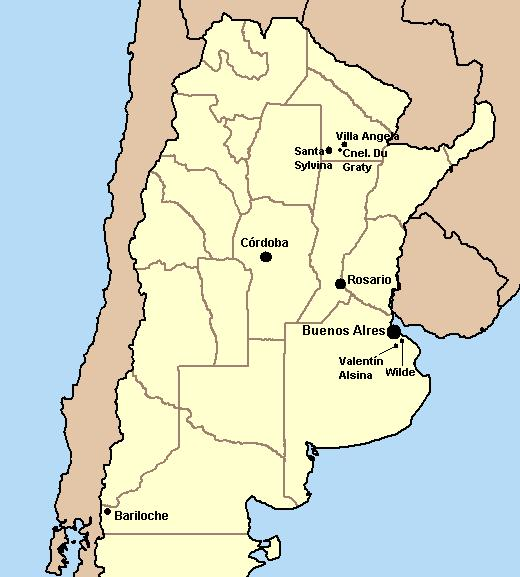 Húngaros, inmigracion, Argentina